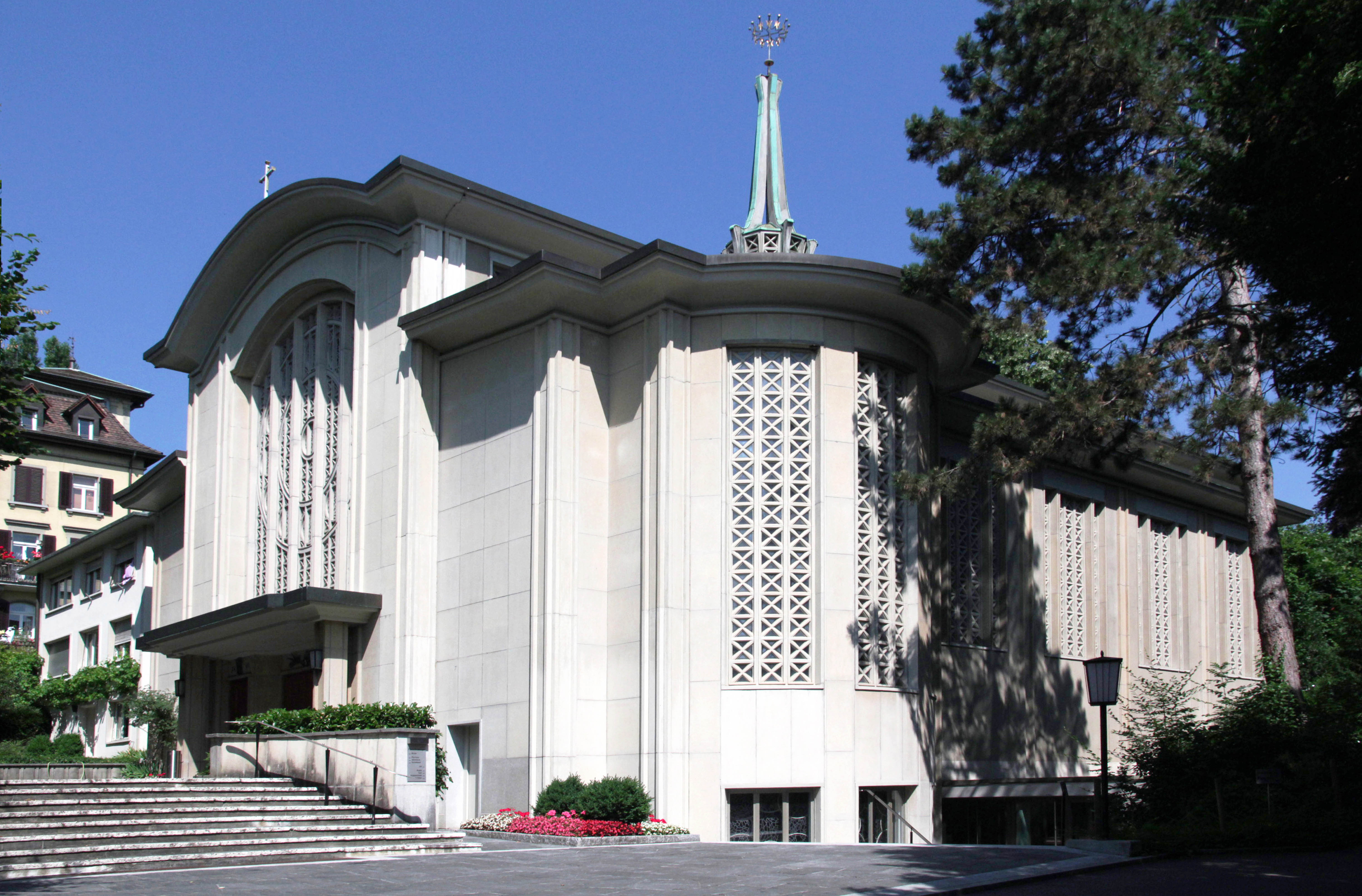 Römisch-katholische Kirche Dreikönigen, Zürich-Enge